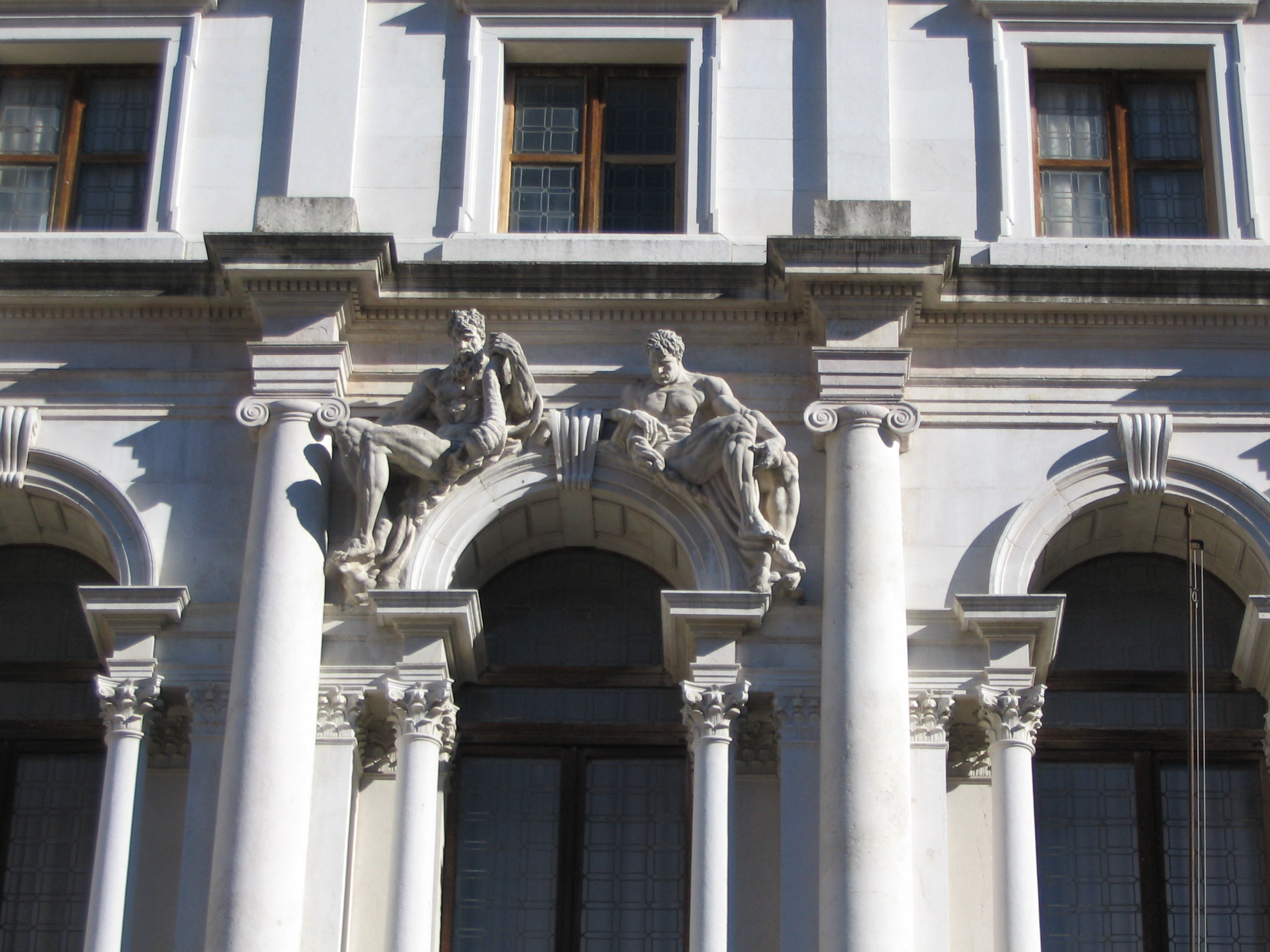 Bergamo, Palazzo Nuovo, statue sulla trabeazione del quinto finestrone da ovest